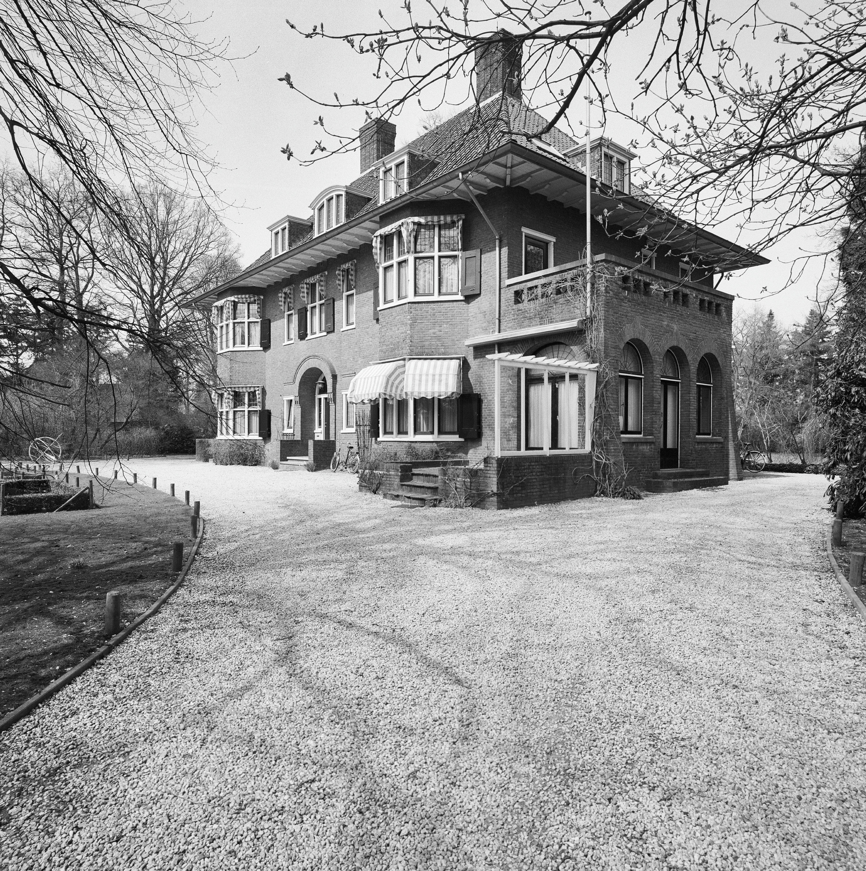 Villa Marienhof: Overzicht voorgevel en rechter zijgevel, villa (opmerking: Gefotografeerd voor MIP Tilburg)